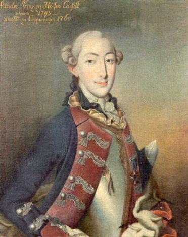 Portrait de Wilhem, prince de Hesse-Cassel (1743-1821)